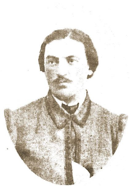 Беларуская (тарашкевіца): Партрэт Яна Эдварда Ваньковіча (Jan Edvard Vańkovič)